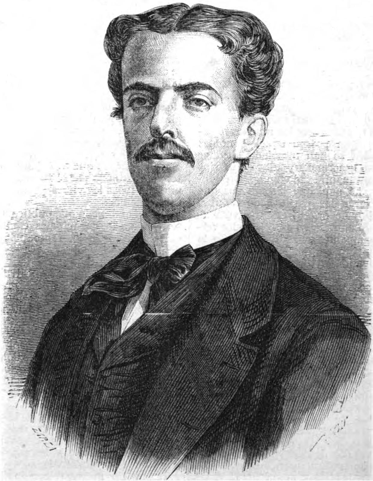 Duque de Aosta.